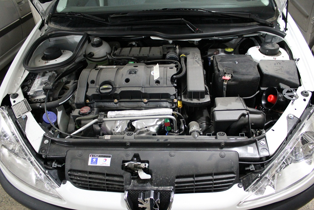 peugeot 206 engine